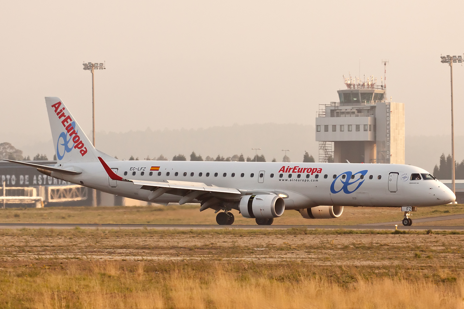 Embraer de Air Europa en el Aeropuerto de Asturias (OVD-LEAS)